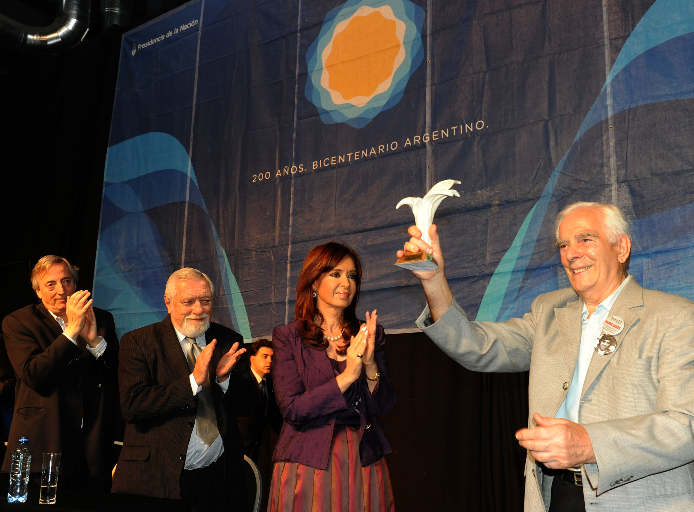 Cristina Fernández de Kirchner entrega el premio Azucena Villaflor a Julio Morresi